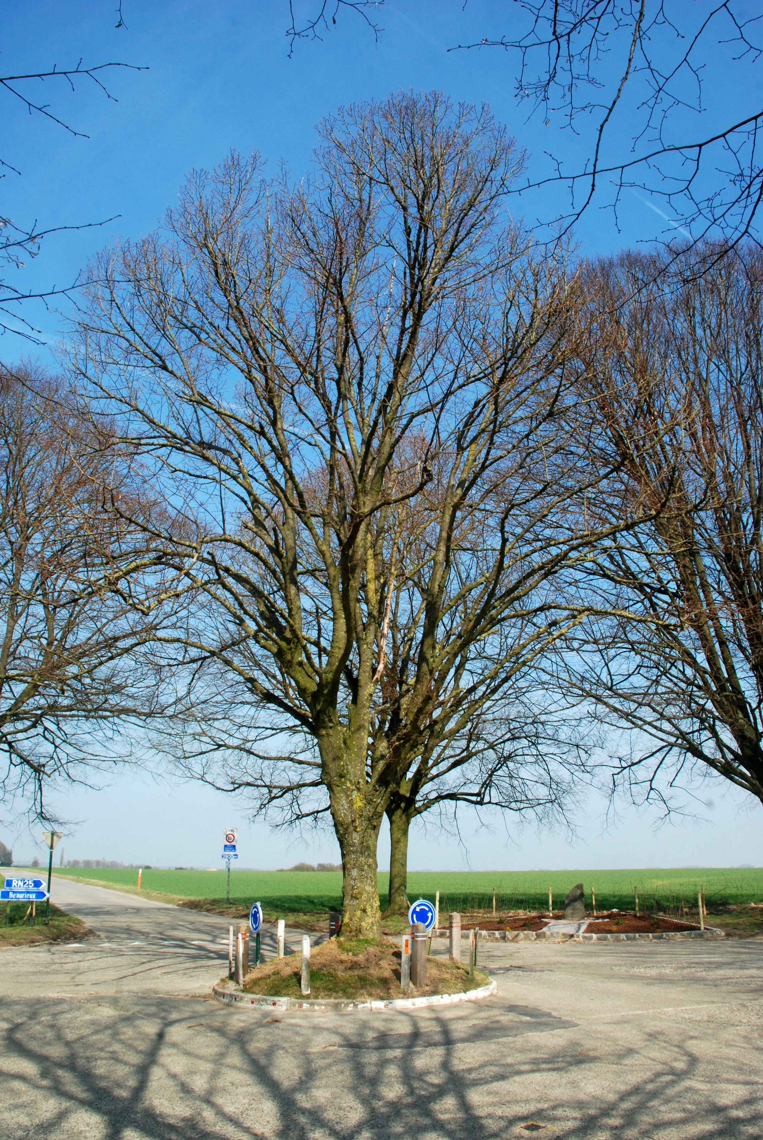 Belgique - Brabant wallon - Court-Saint-Étienne - Arbre de la justice